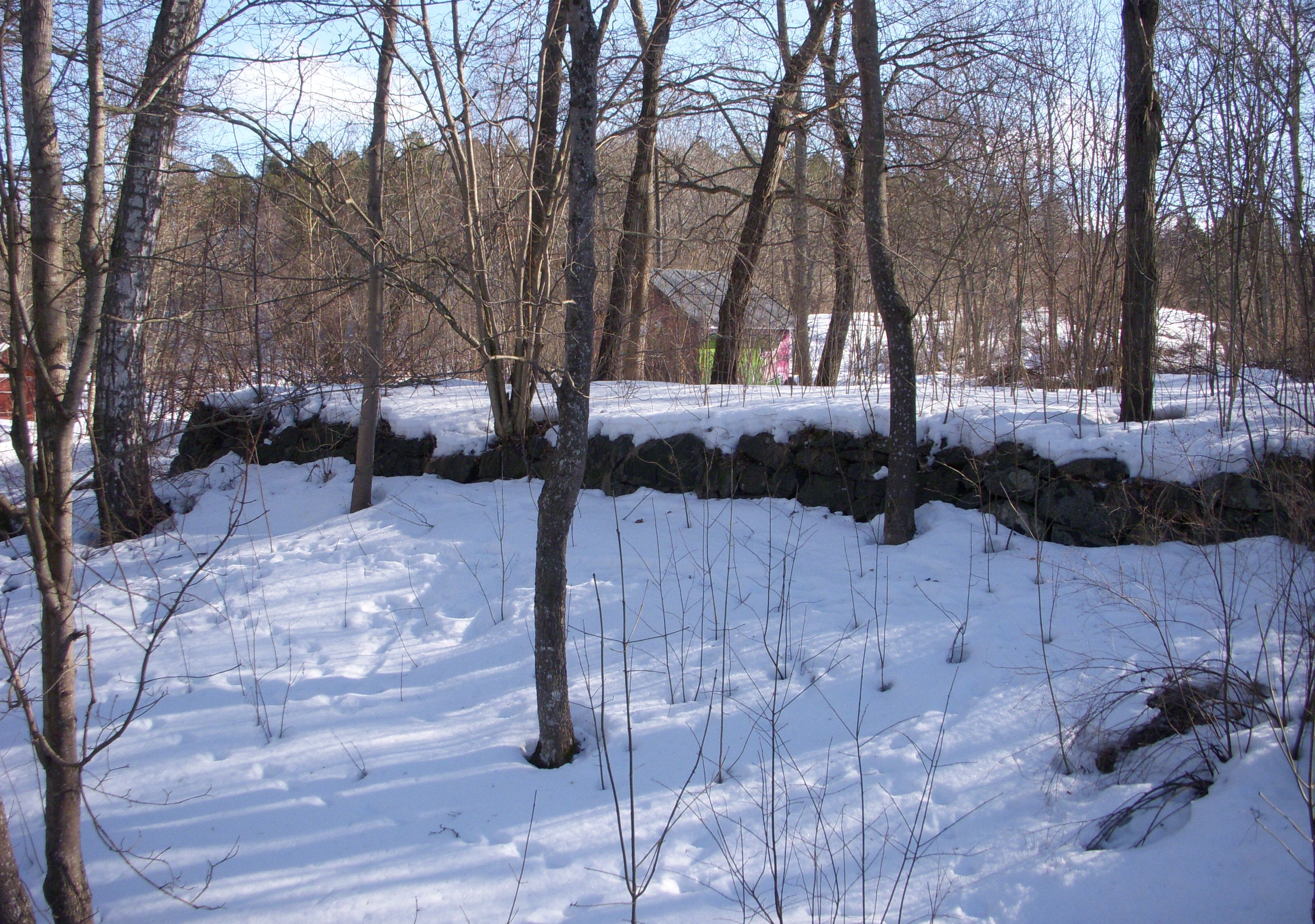 Forsens gård, fundamentrester i Farsta strand